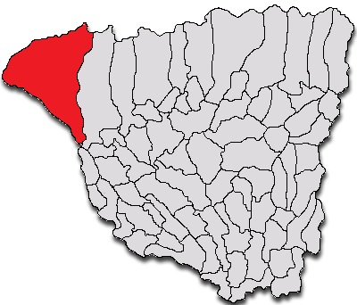 Categorie:Hărţi ale judeţului Gorj